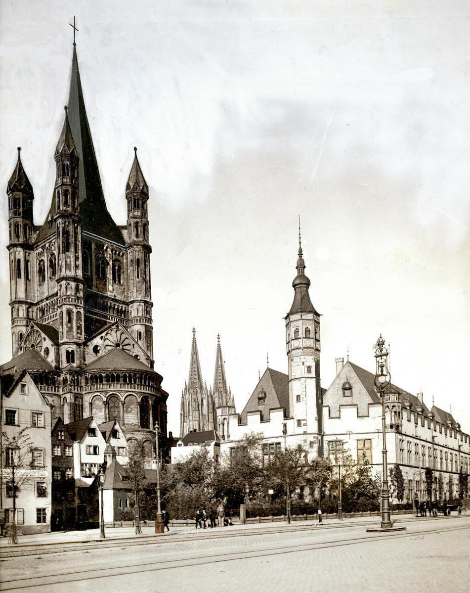 Köln, Fischmarkt mit der romanischen Kirche Groß St. Martin und dem mittelalterlichen Stapelhaus zur rechten. Im Hintergrund der Kölner Dom. Ansicht um 1900.